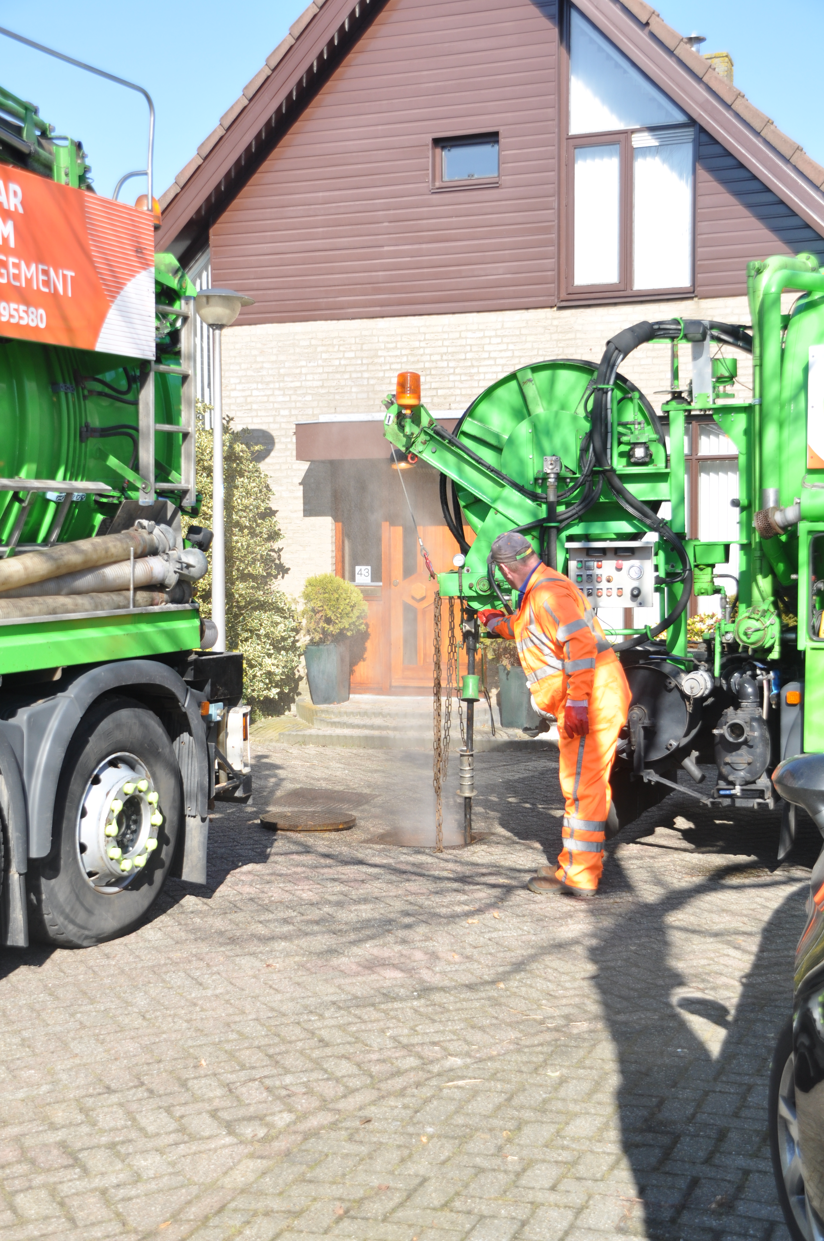 Riool renovatie aan de Pinaskade in Zoetermeer.